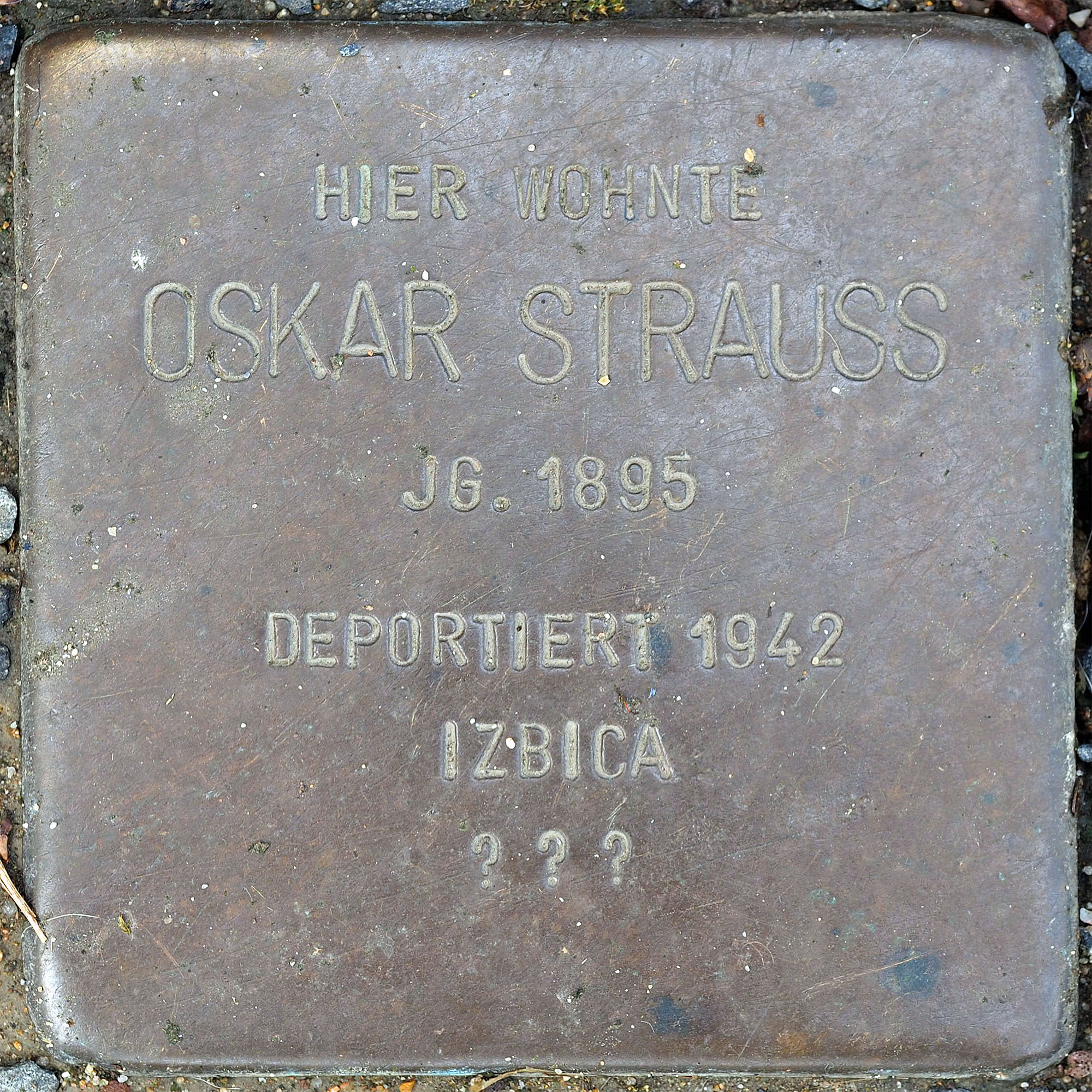 Stolpersteine MG: Strauss, Oskar